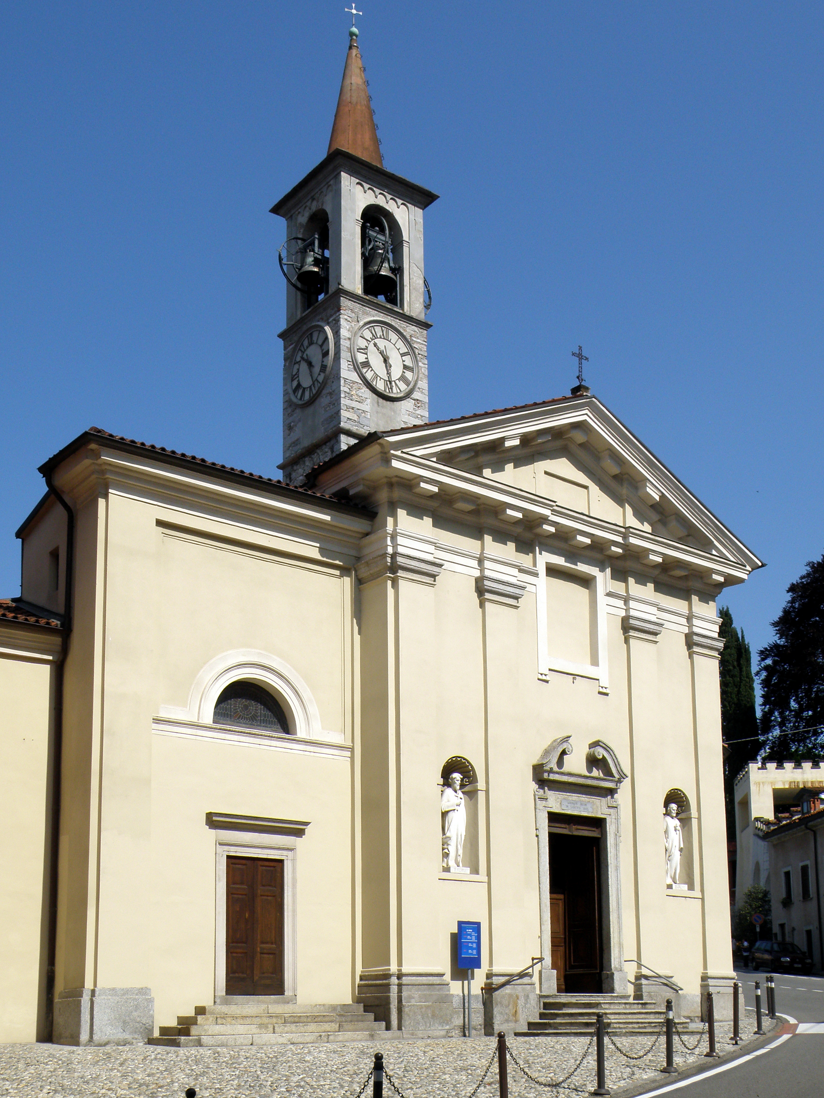 Laveno-Mombello (VA). Chiesa parrocchiale di San Filippo e Giacomo, detta Chiesa Vecchia.